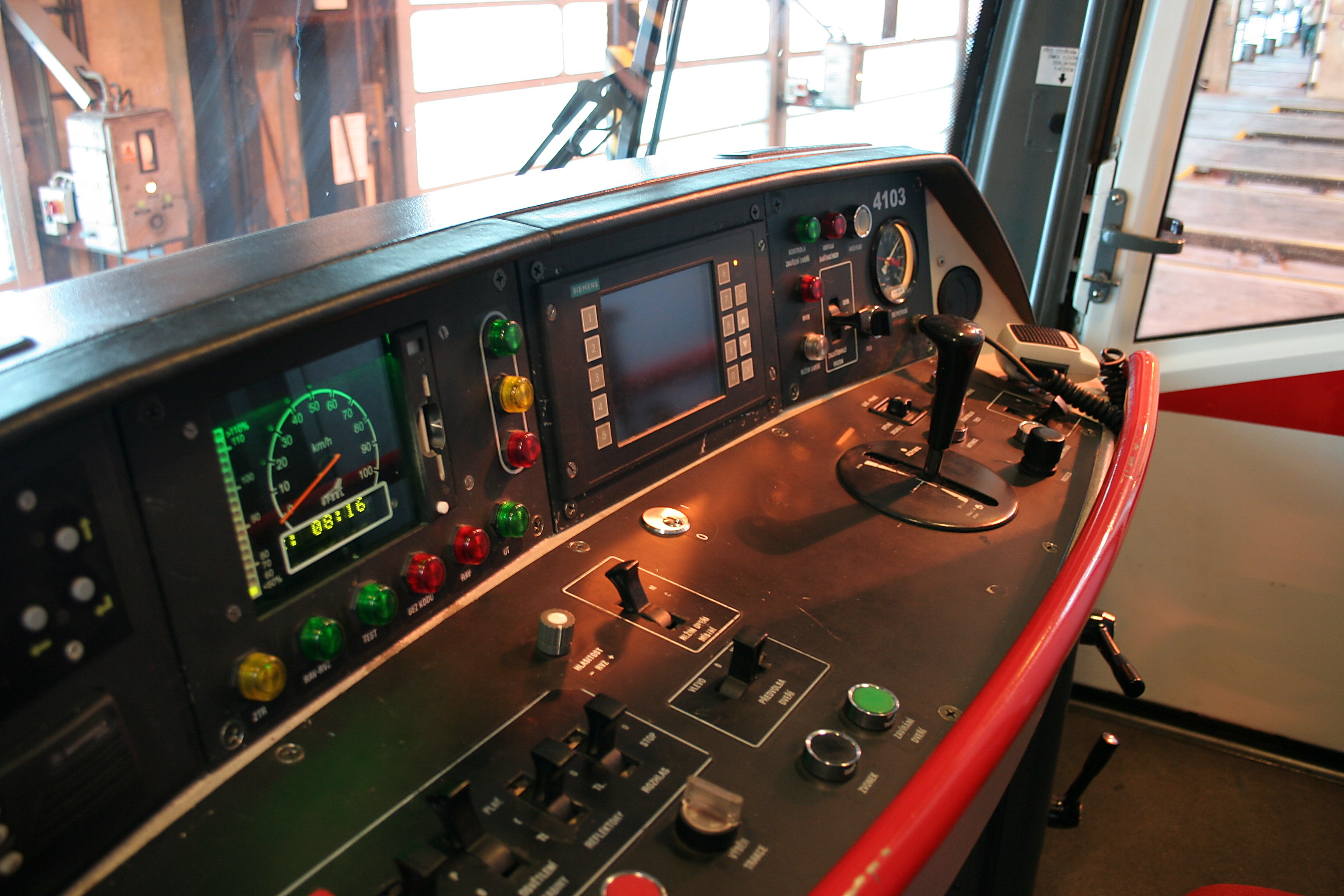 Pracoviště strojvůdce.